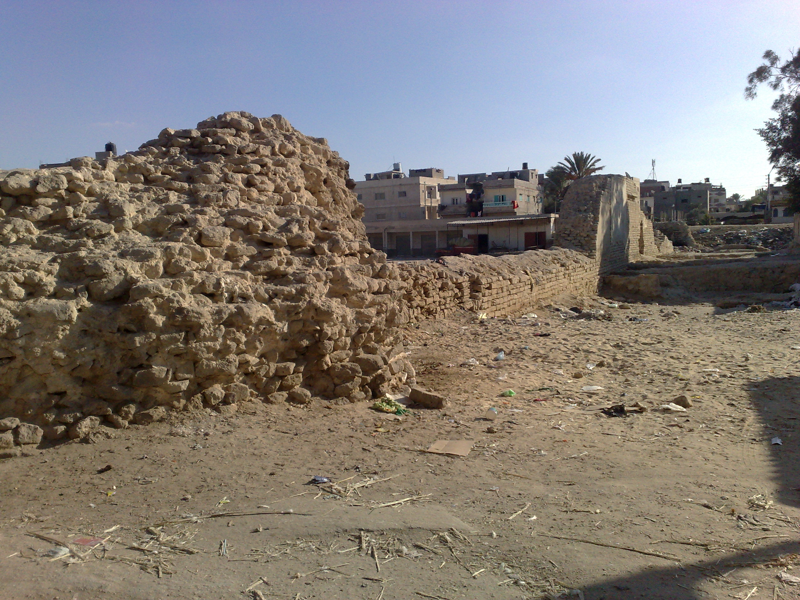 بقايا قلعى العريش التي أنشأها السلطان قنصوه الغوري على درب الحج المصري بوسط سيناء